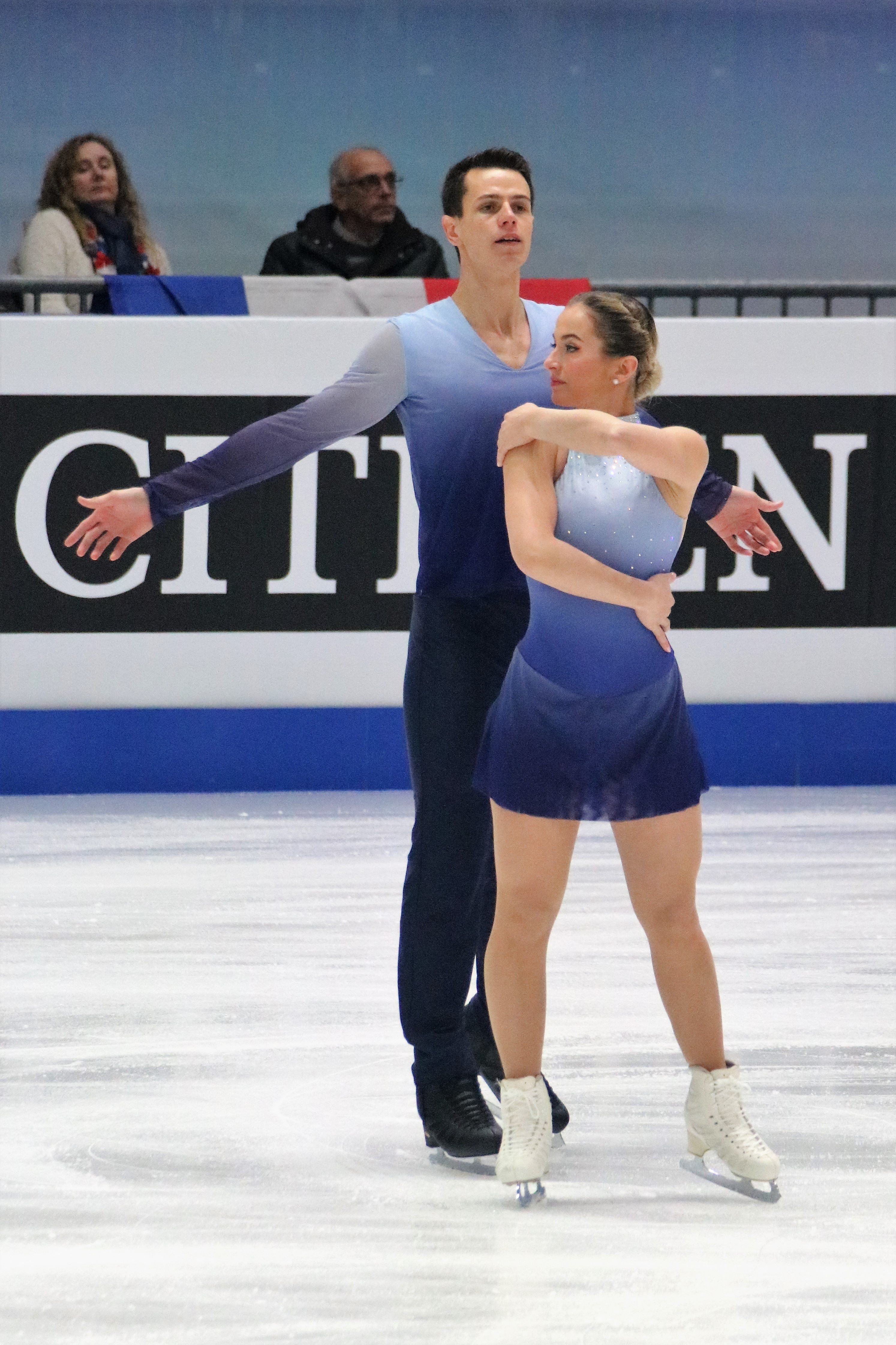 Александра Хербрикова / Николас Руле (Швейцария) на чемпионате Европы по фигурному катанию 2020